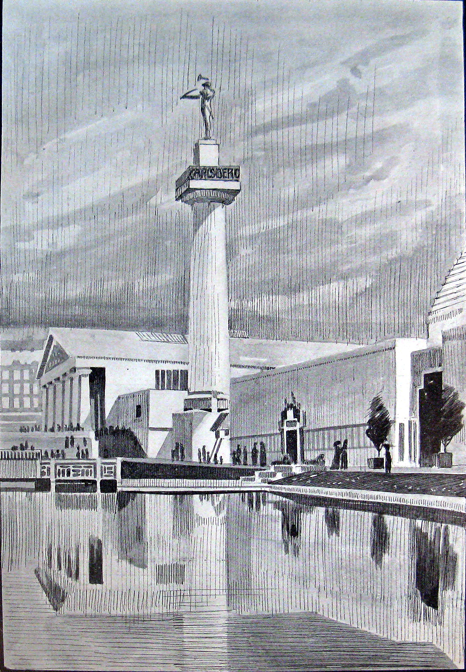 Carsbergs sejrssøjle ved Landsudstillingen Aarhus 1909